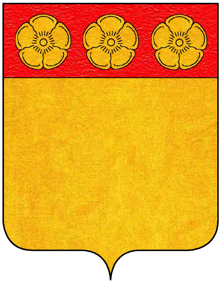 Stemma della famiglia Paruta, appartenente al patriziato di Venezia.